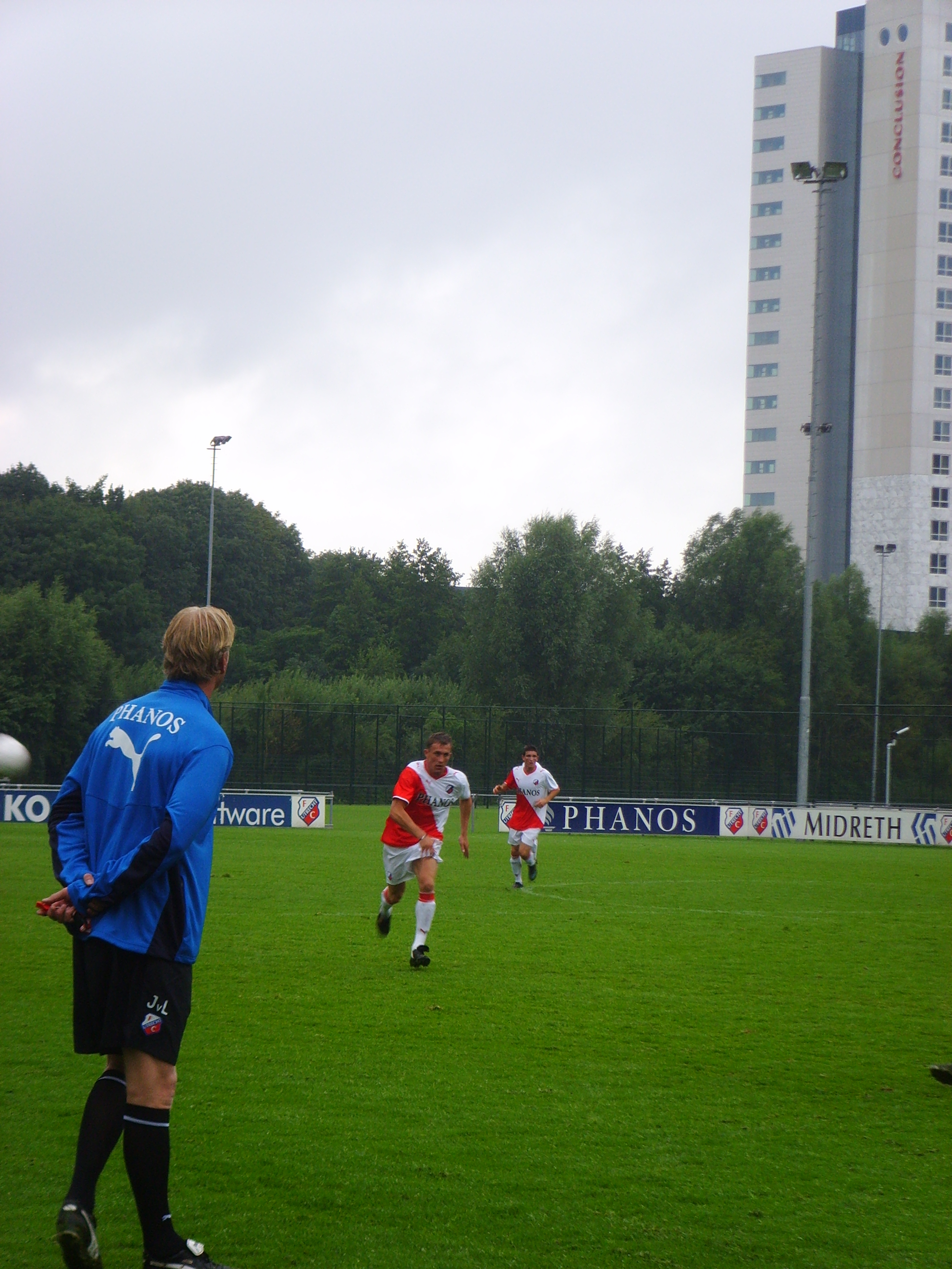 Trainer John van Loen bekijkt Tim Cornelisse op de eerste training van het seizoen 2008-2009 van FC Utrecht